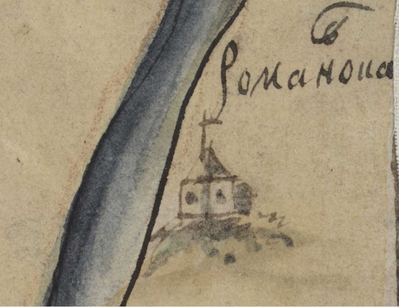 Фрагмент карти Київської губернії. XVIII століття. РГАДА, ф. 192, оп. 1, Киевская губ., № 5.